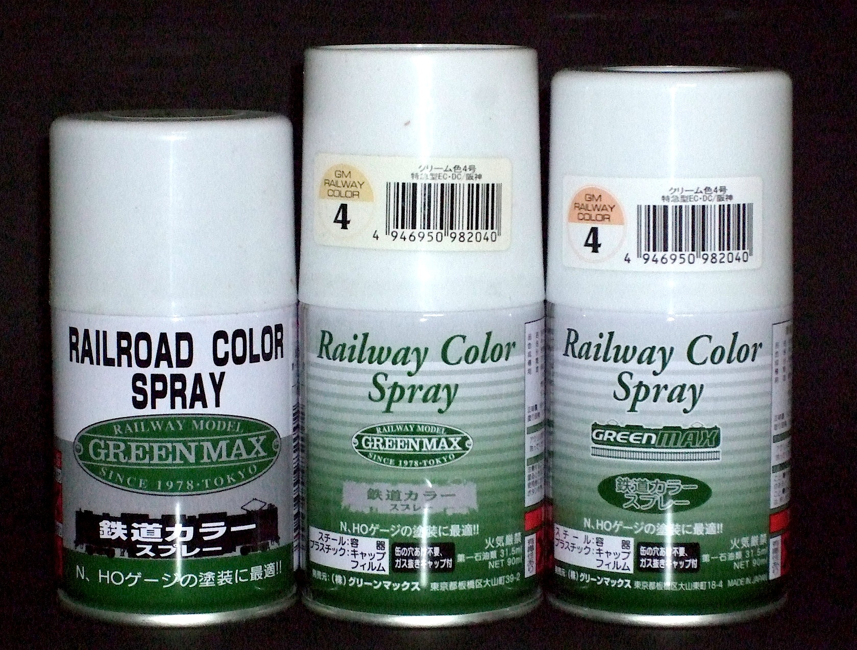 グリーンマックス鉄道カラースプレー